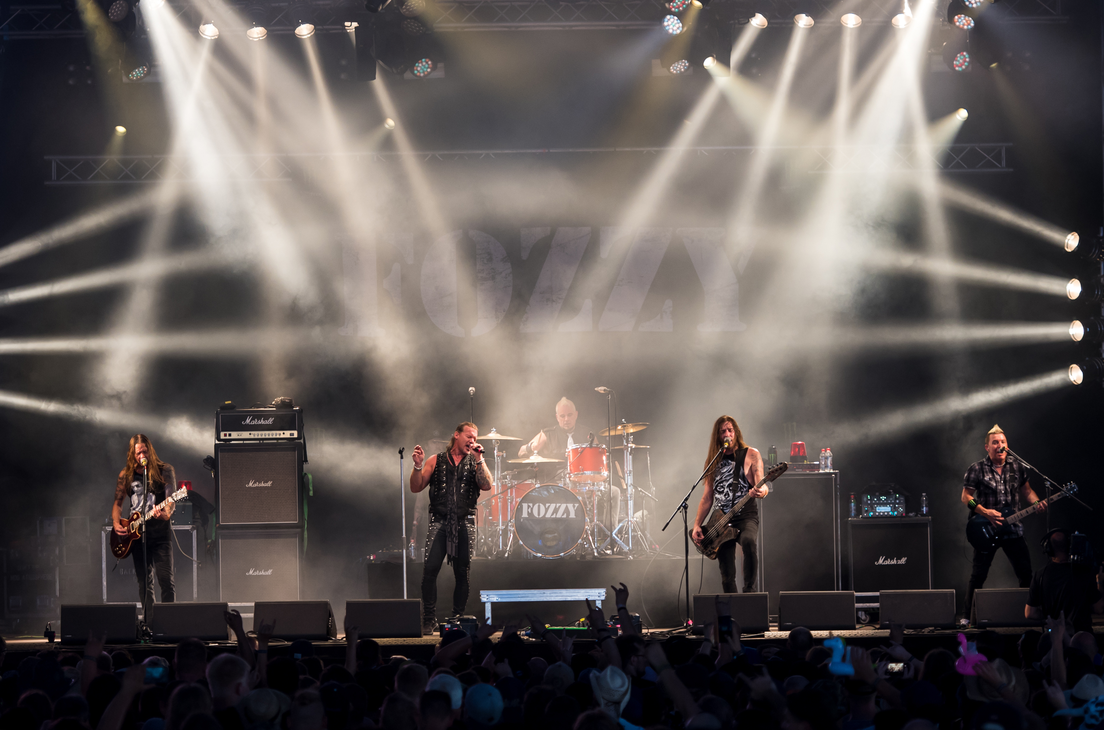 Fozzy beim Wacken Open Air 2018